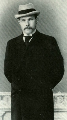 Alexander Alexejewitsch Borissow - war ein russischer Maler. Er gilt als Maler des russischen arktischen Nordens und hat einen Teil seines Werkes den indigenen Völkern des russischen Ostens gewidmet.